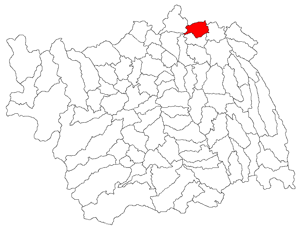 Categorie:Hărţi ale judeţului Bacău